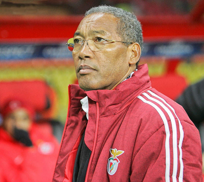 Shéu Han, antigo jogador do clube, agora secretário técnico do Sport Lisboa e Benfica